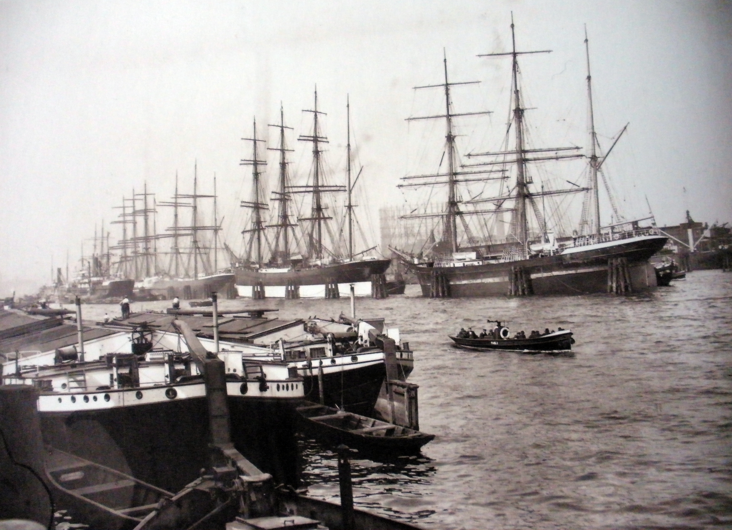 Segelschiffhafen auf dem Kleinen Grasbrook im Hafen Hamburg